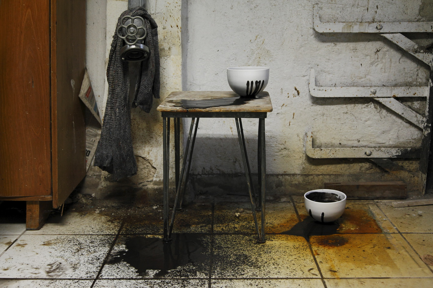 Karina Marusińska, "II. V.", 2014, porcelana, [2x] 10 x 14 x 14 cm; realizacja w ramach akcji przeciw głodowi „Empty Bowls”; fot. Justyna Fedec